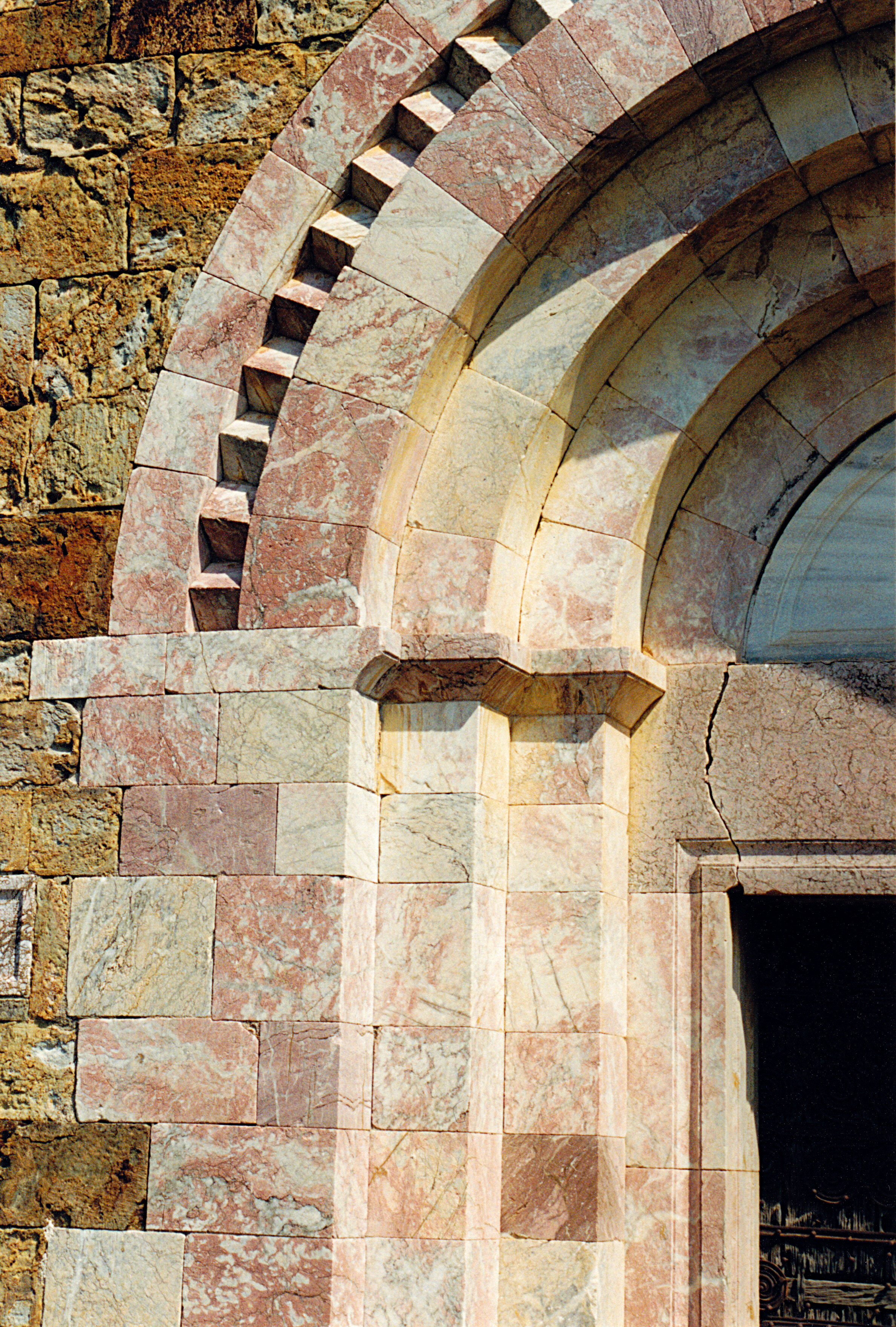 France - Conflent - Prieuré de Marcevol